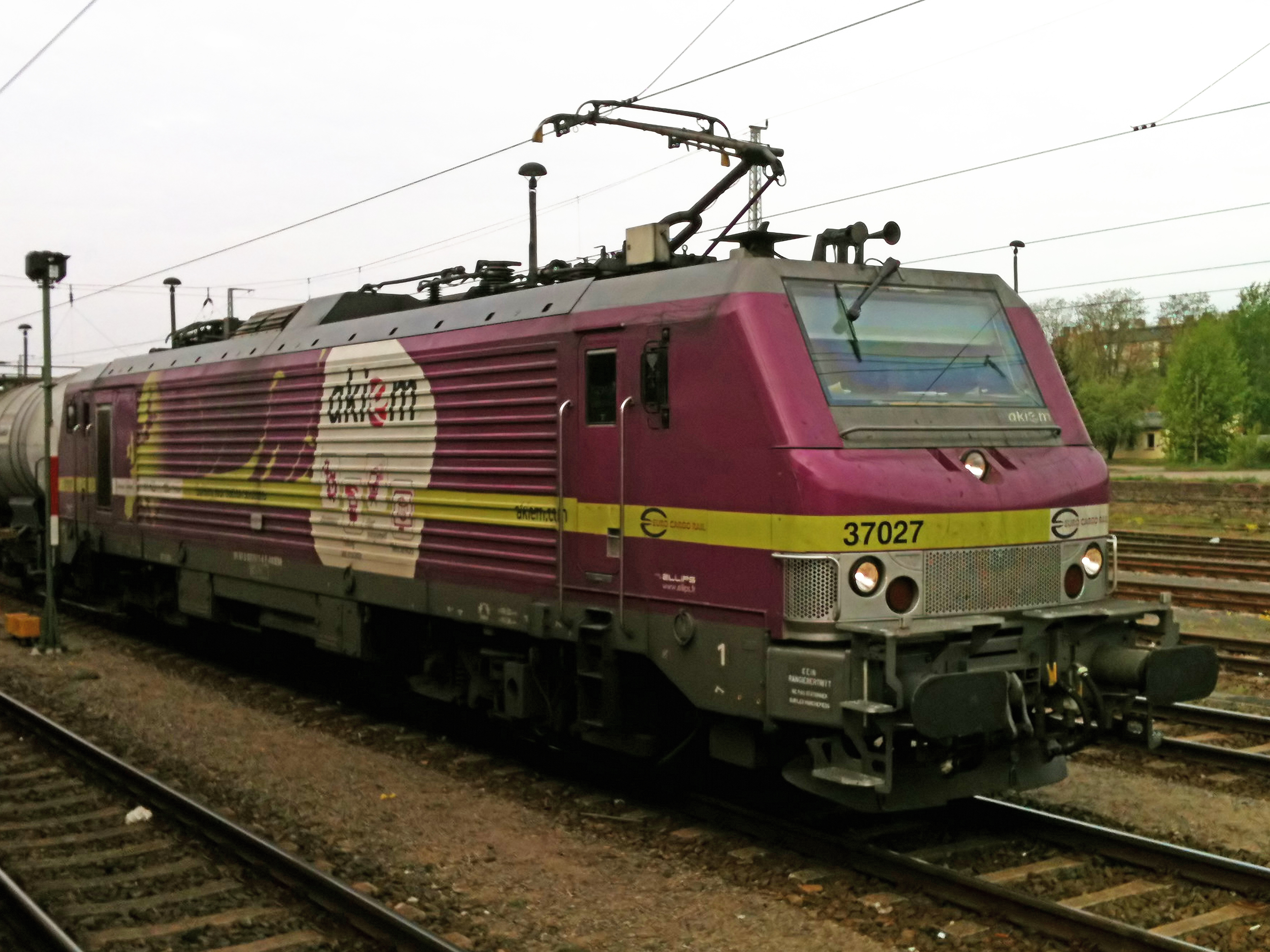 unbekannte E-Lok